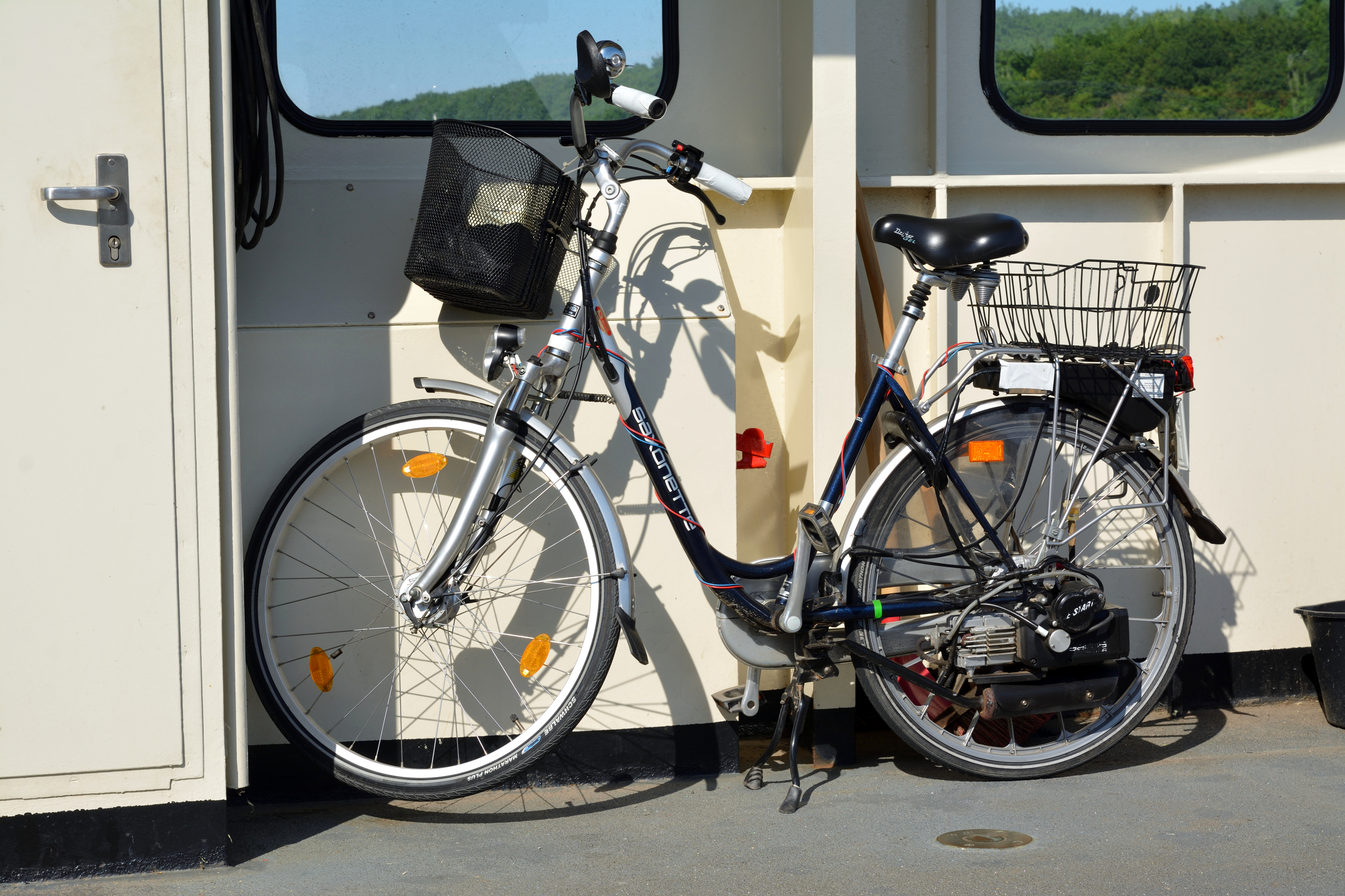 Eine Saxonette auf der Fähre über den Nord-Ostsee-Kanal.